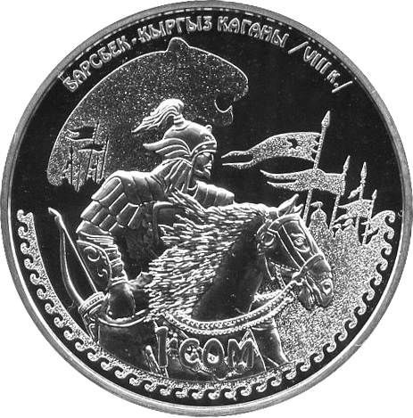 Памятная монета Кыргызстана "Барсбек" - 1 сом 2014 - медно-никелевый сплав Кыргызча: Барсбек